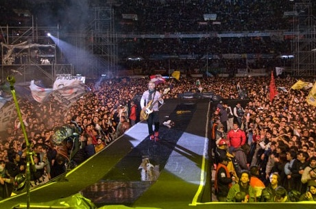 Los Piojos, durante su ultimo concierto en el Estadio River Plate el 30 de mayo de 2009